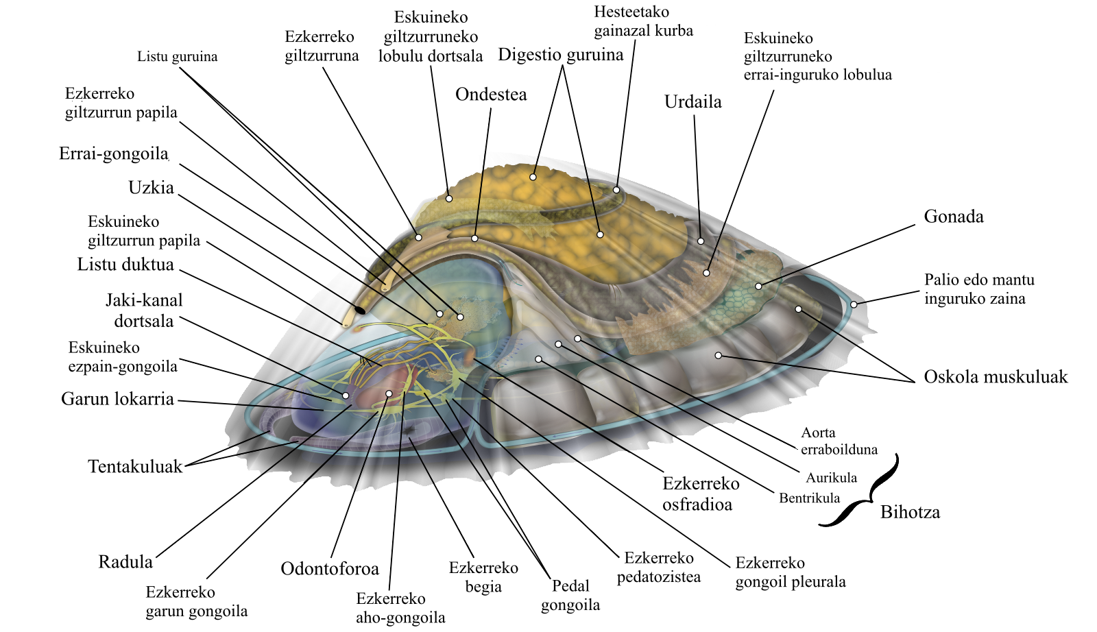 Laparen barne egituraren eskema.